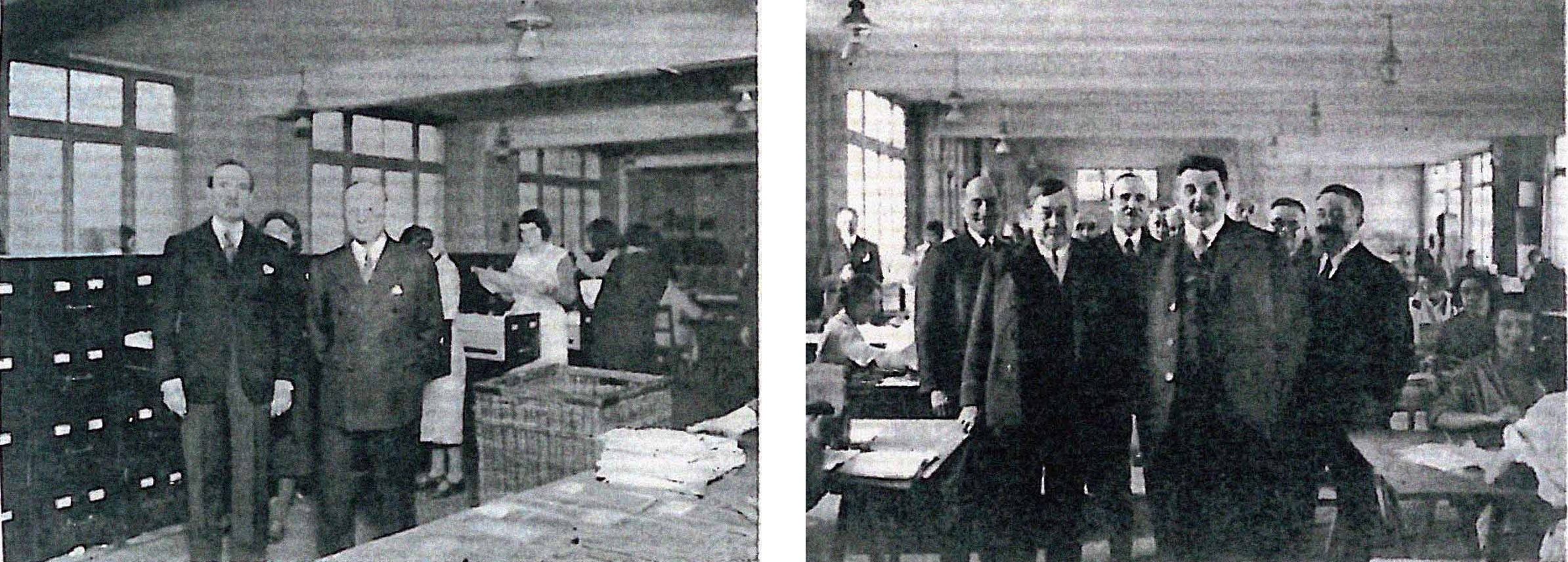 Le constructeur Citroën et le savant Painlevé l'Ecole Universelle